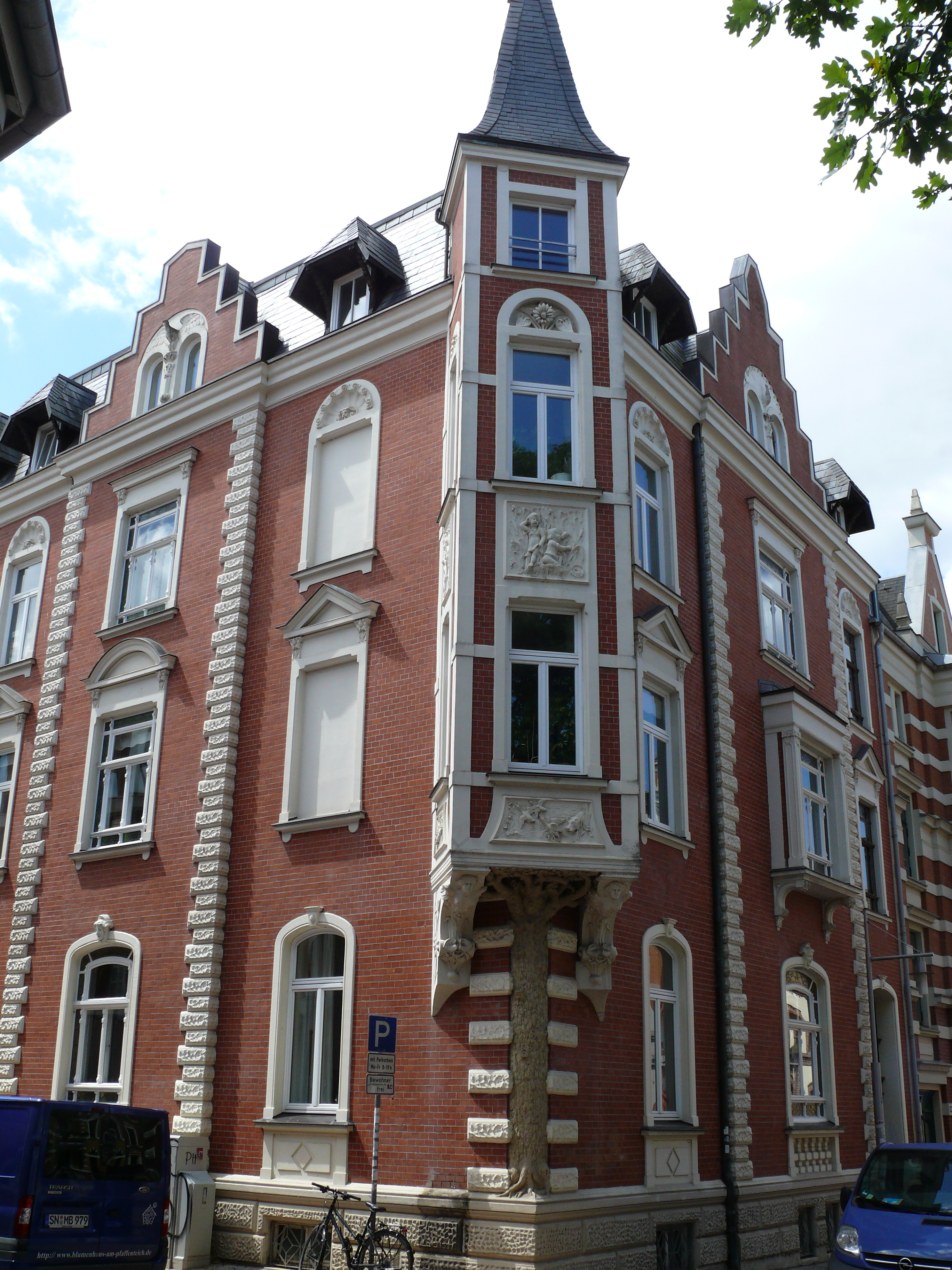 Das Gebäude "Körnerstraße 12" in Schwerin.